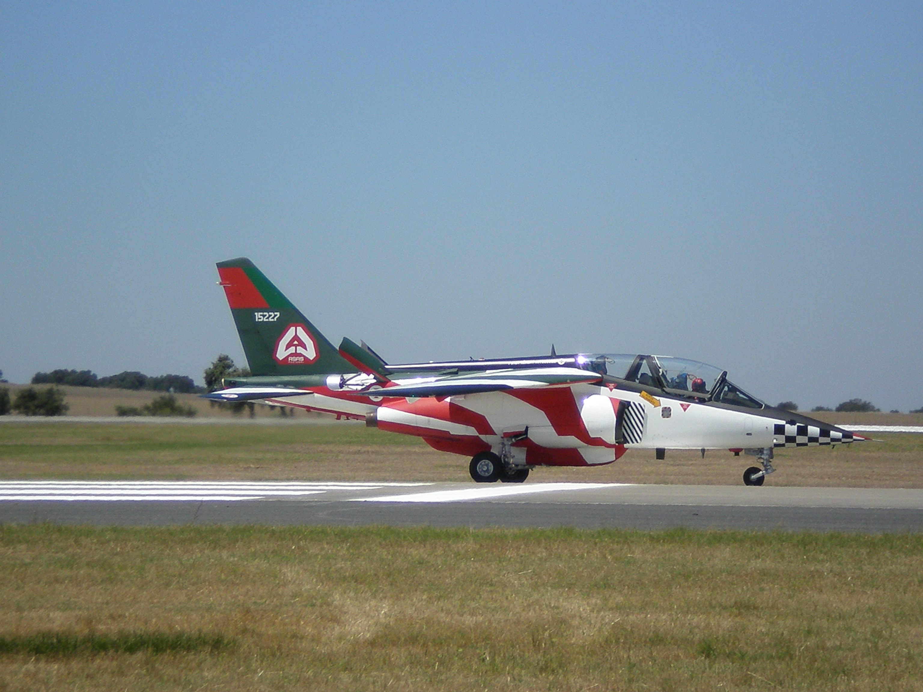 Alpha Jet da Força Aérea Portuguesa (15227), integrante da formação dos Asas de Portugal, depois de uma demontração aérea nas comemorações 55º aniversário da FAP, realizada na Base Aérea de beja de Beja.